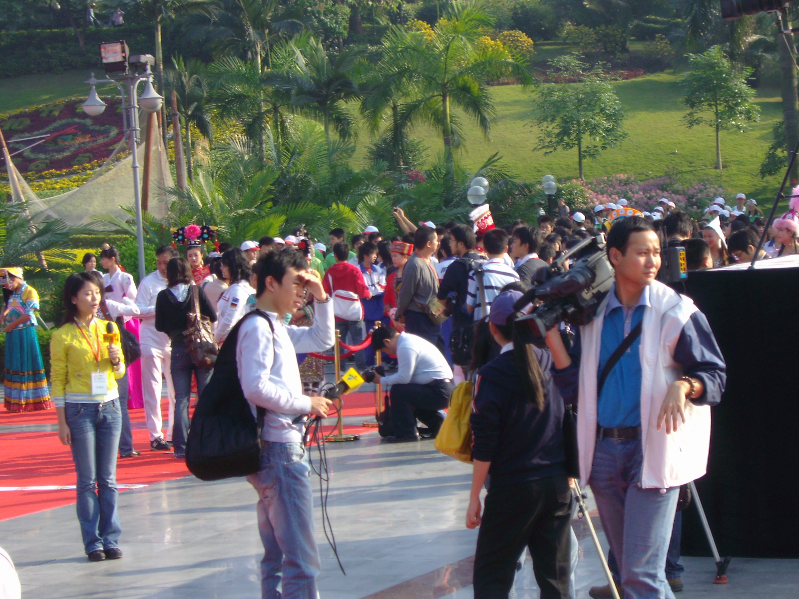 中文（中国大陆）: 2007年全国少数民族运动会广州火炬接力起跑仪式，广东电视台记者手举带有旧“广”字图形台标的话筒，南方电视台记者手举带有正体橙黑双色双线“TVS”台标的话筒。